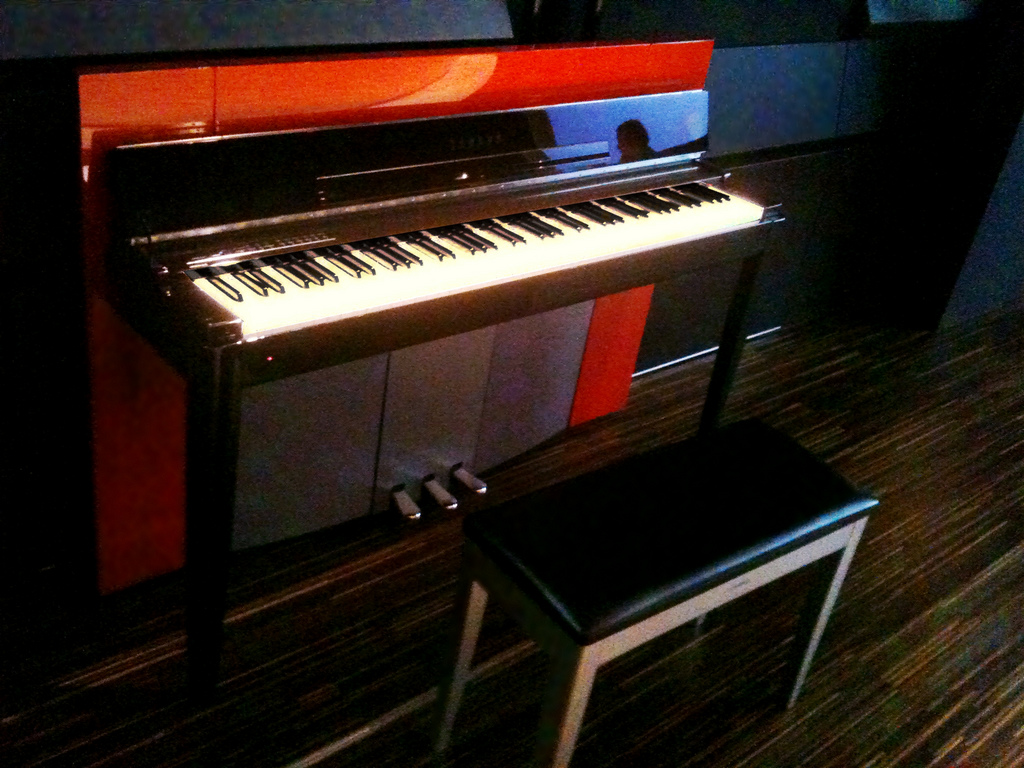 YAMAHA MODUS F11 Slimline Digital Piano 11. MODUS F11, Yamaha Design Masterworks